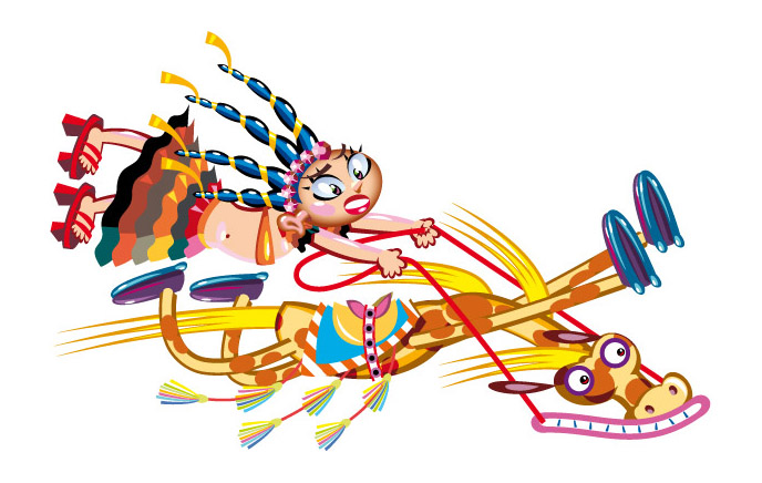 Adobe Illustrator stripdetail door Evert Geradts